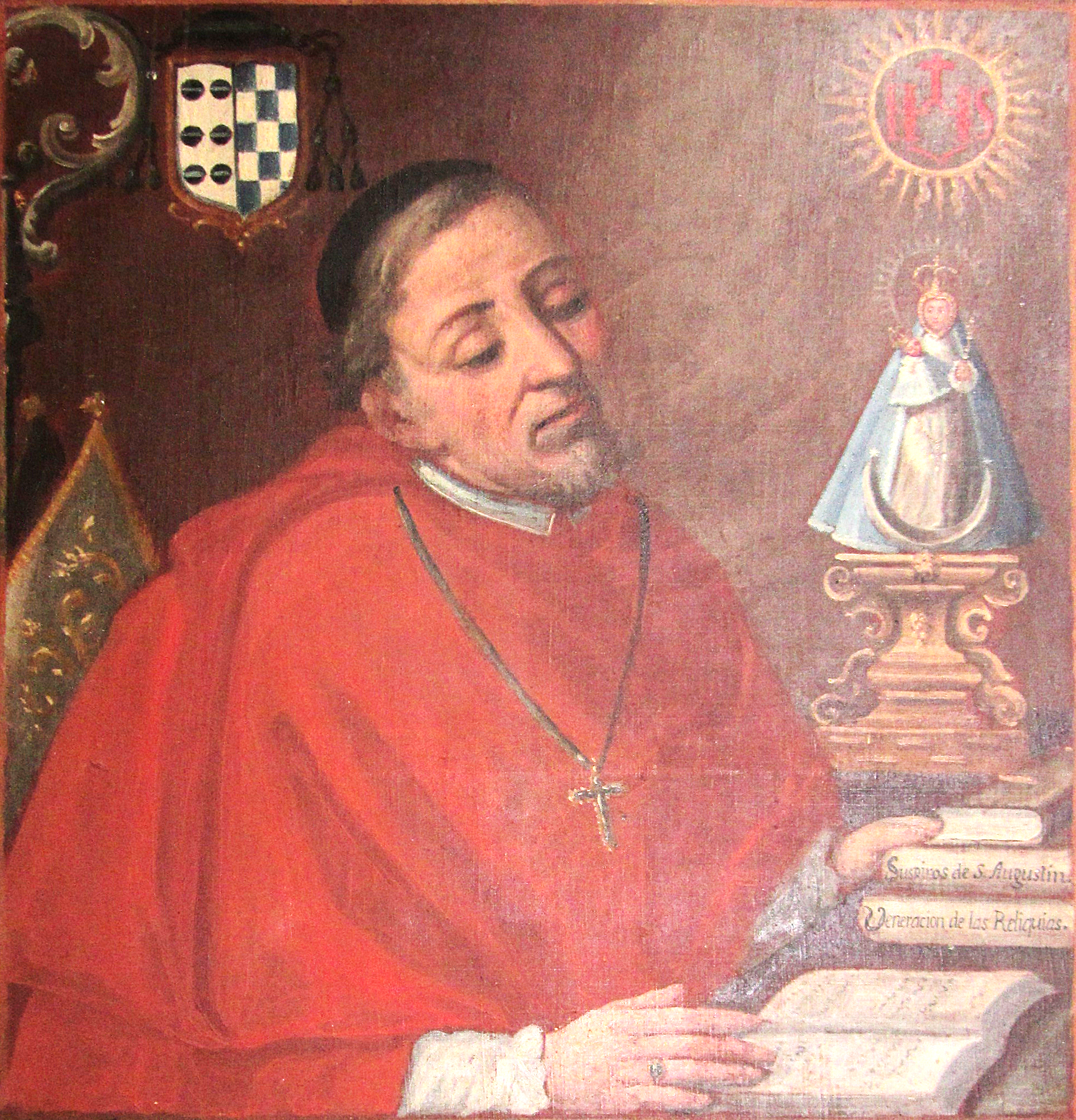 Retrato del obispo Sancho Dávila y Toledo (1546-1625) en el Palacio Episcopal de Jaén (Andalucía - España). Fue sucesivamente obispo de Cartagena, de Jaén, de Sigüenza y de Plasencia.